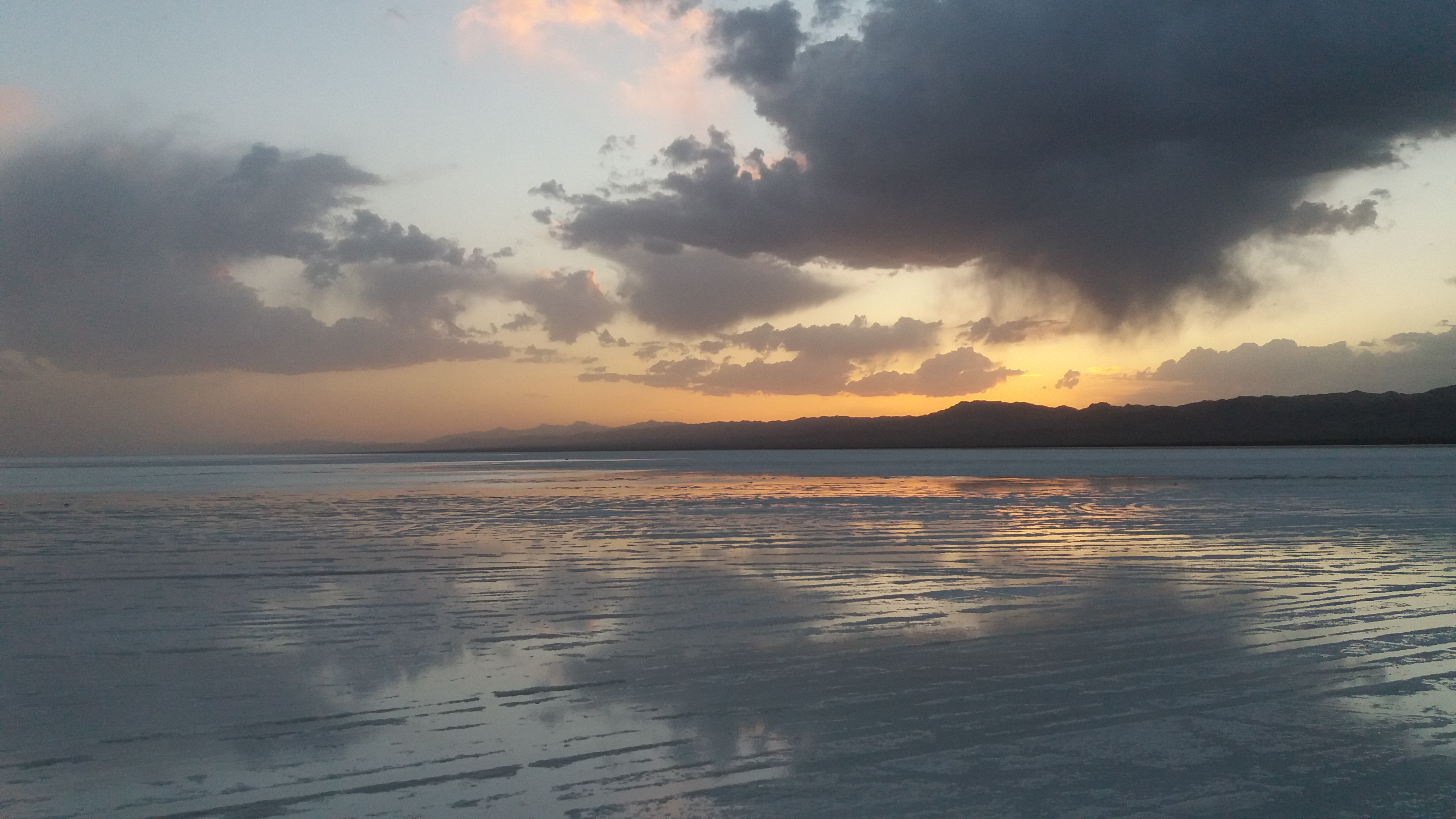 دریاچه کویر نمک بردسکن